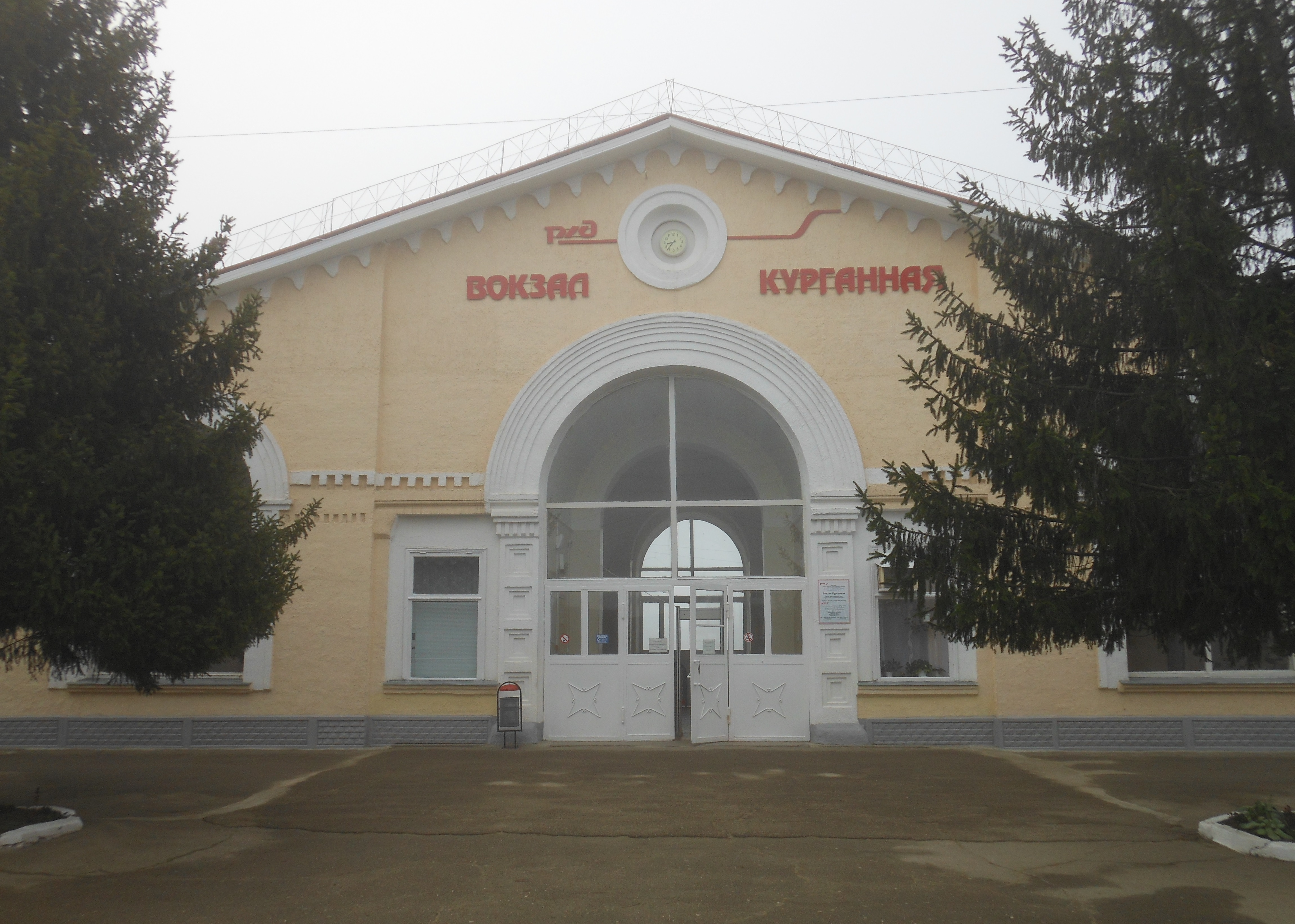 Железнодорожный вокзал станции Курганная